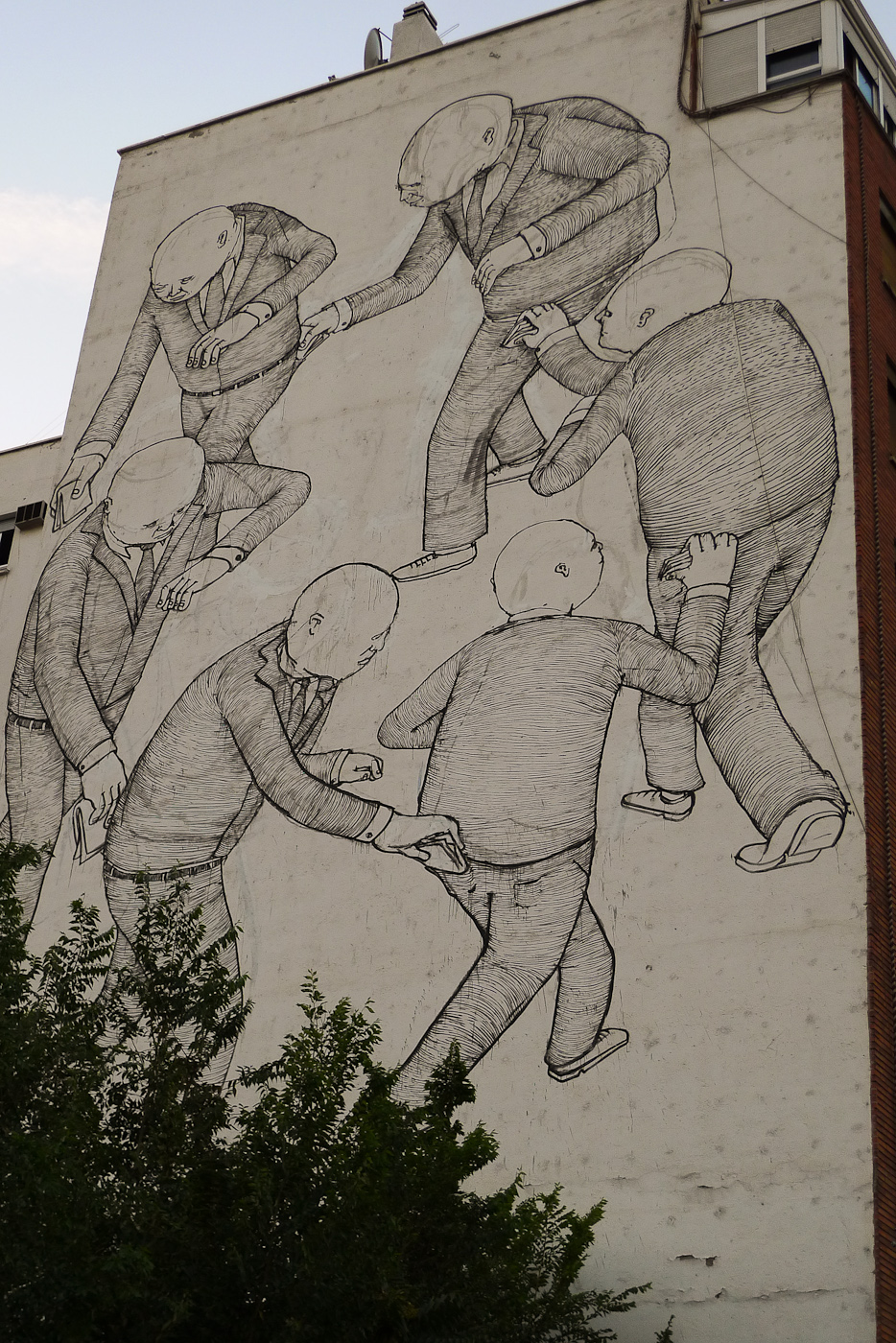 Arte urbano obra de Blu, avenida del Manzanares, Madrid, España.